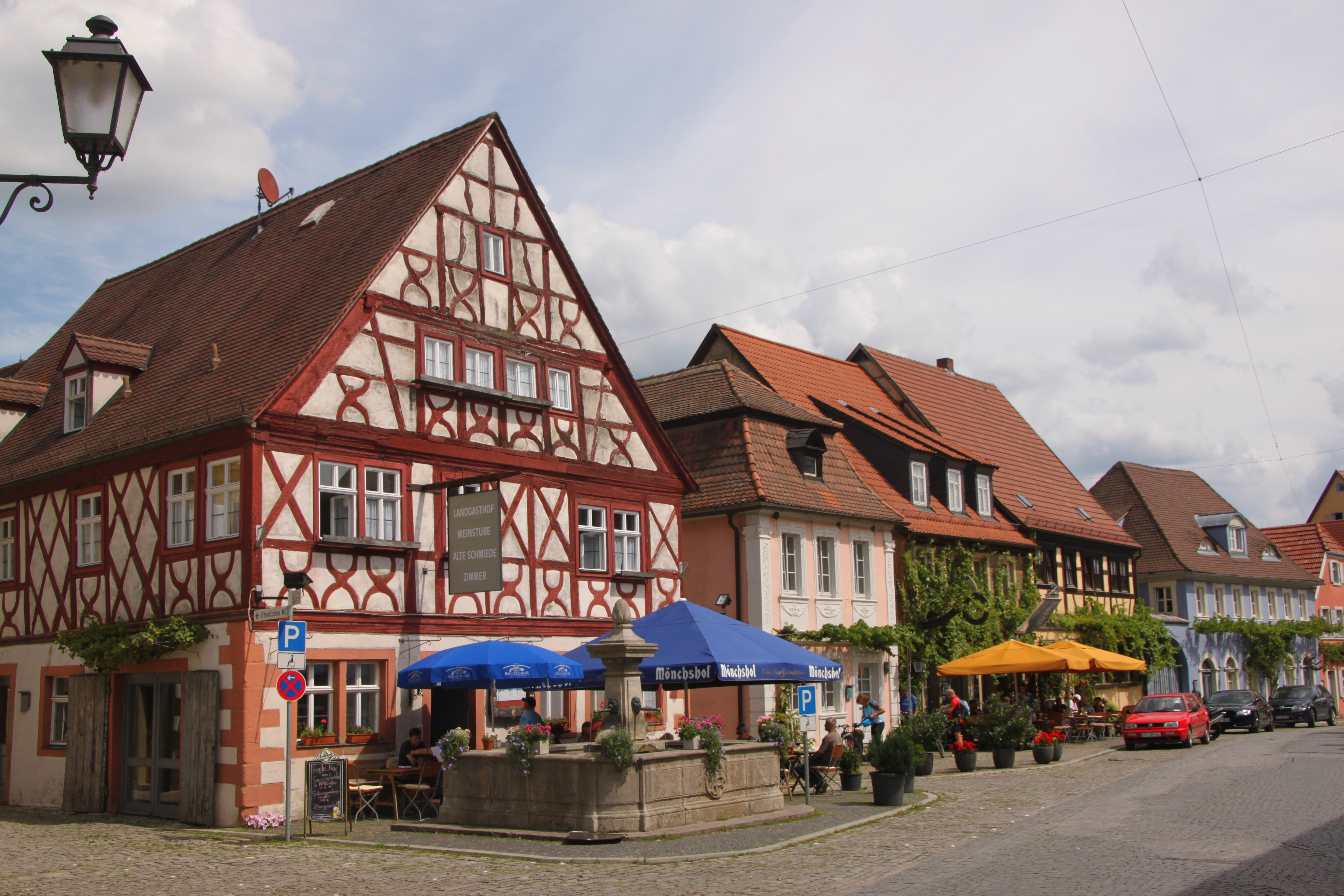 Prichsenstadt, Karlsplatz